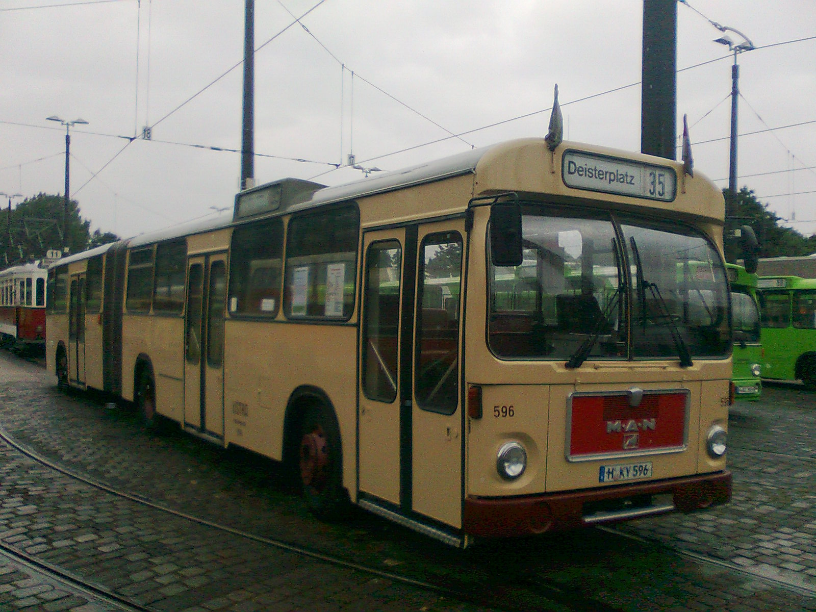 historischer Gelenkbus Bj. 1980, TdoT Btf Glocksee